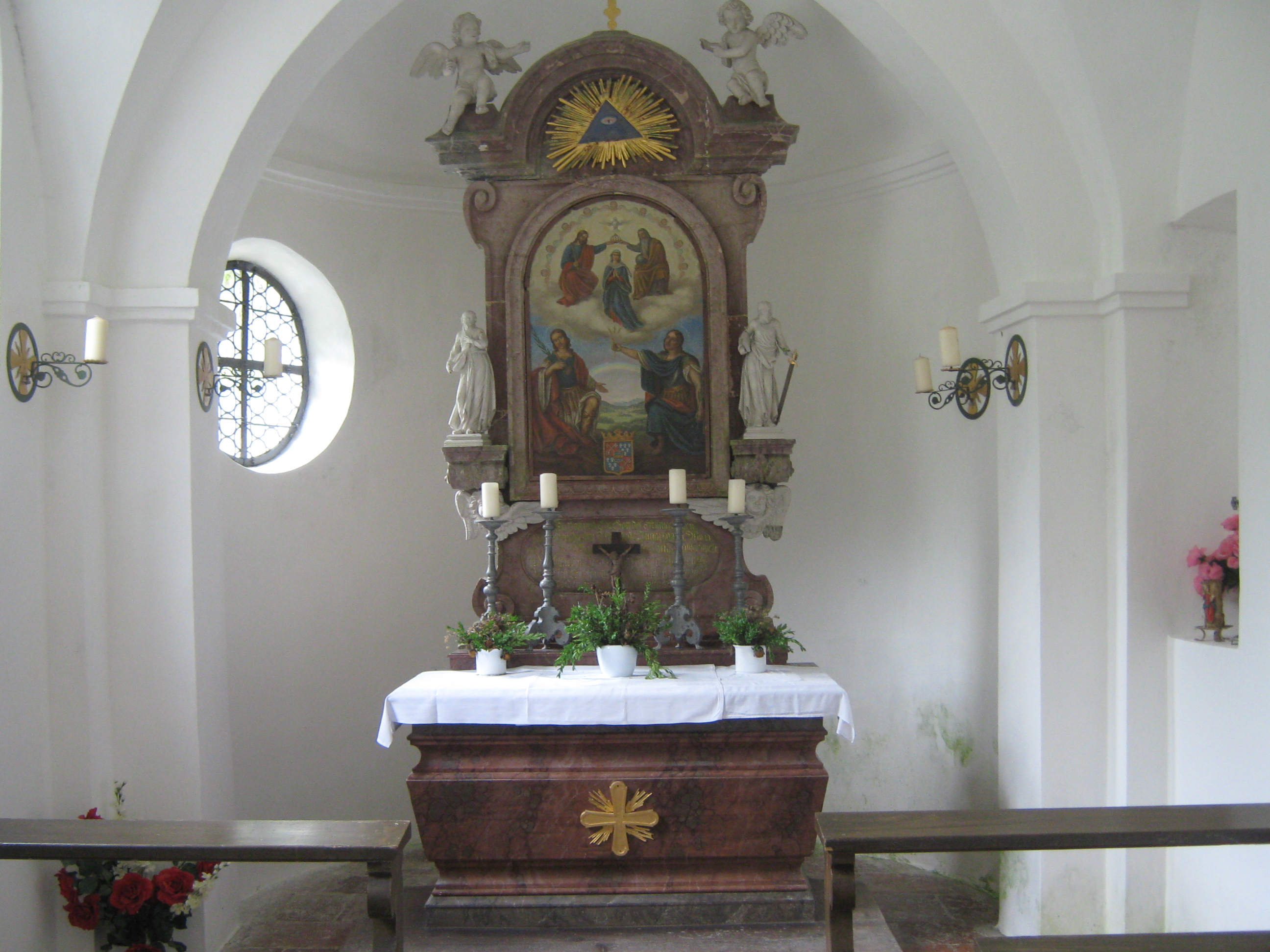 Waldkapelle St. Johann und Paul bei St. Bartholomä am Königssee, Altar